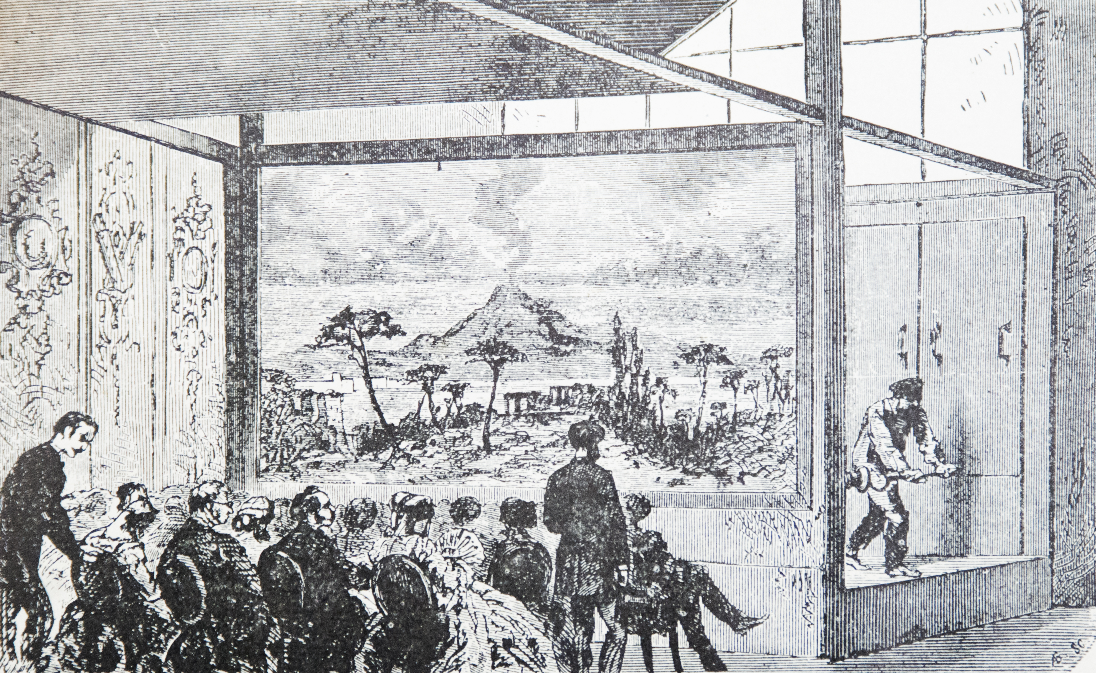 Diorama de Daguerre y Bouton (1822), antecedente histórico del audiovisual, muy anterior al cine, junto con el de la linterna mágica (1660).